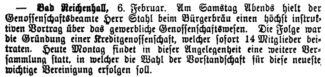 Bericht vom Reichenhaller Grenzboten über den Vortrag vom Genossenschaftsbeamten Herrn Stahl im Bürgerbräu Bad Reichenhall.